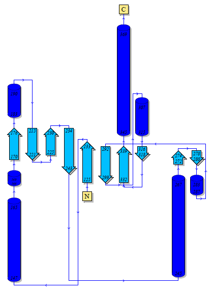 top2 ckm